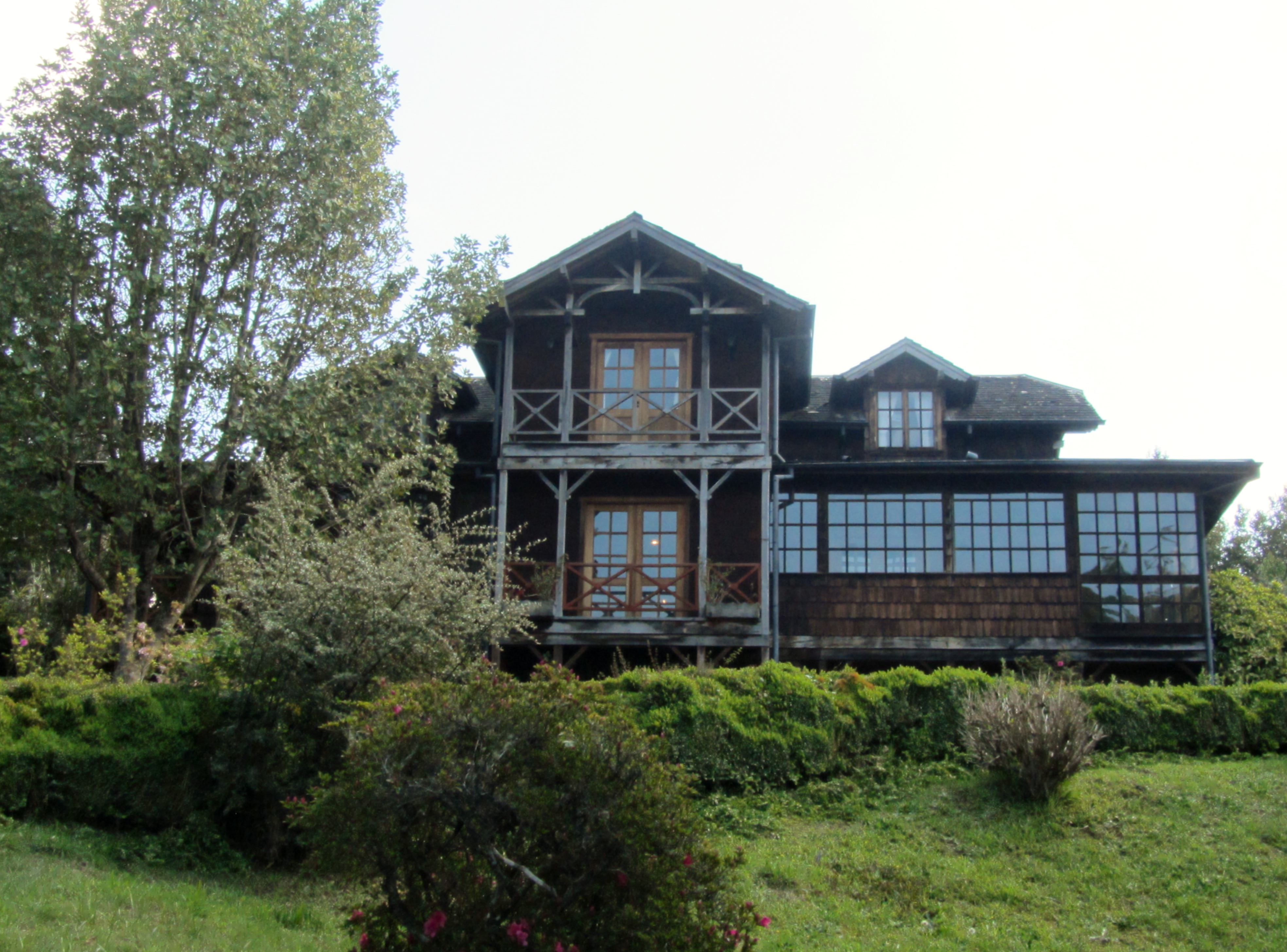 Casona de campo; Museo Colonial Alemán de Frutillar, Chile.